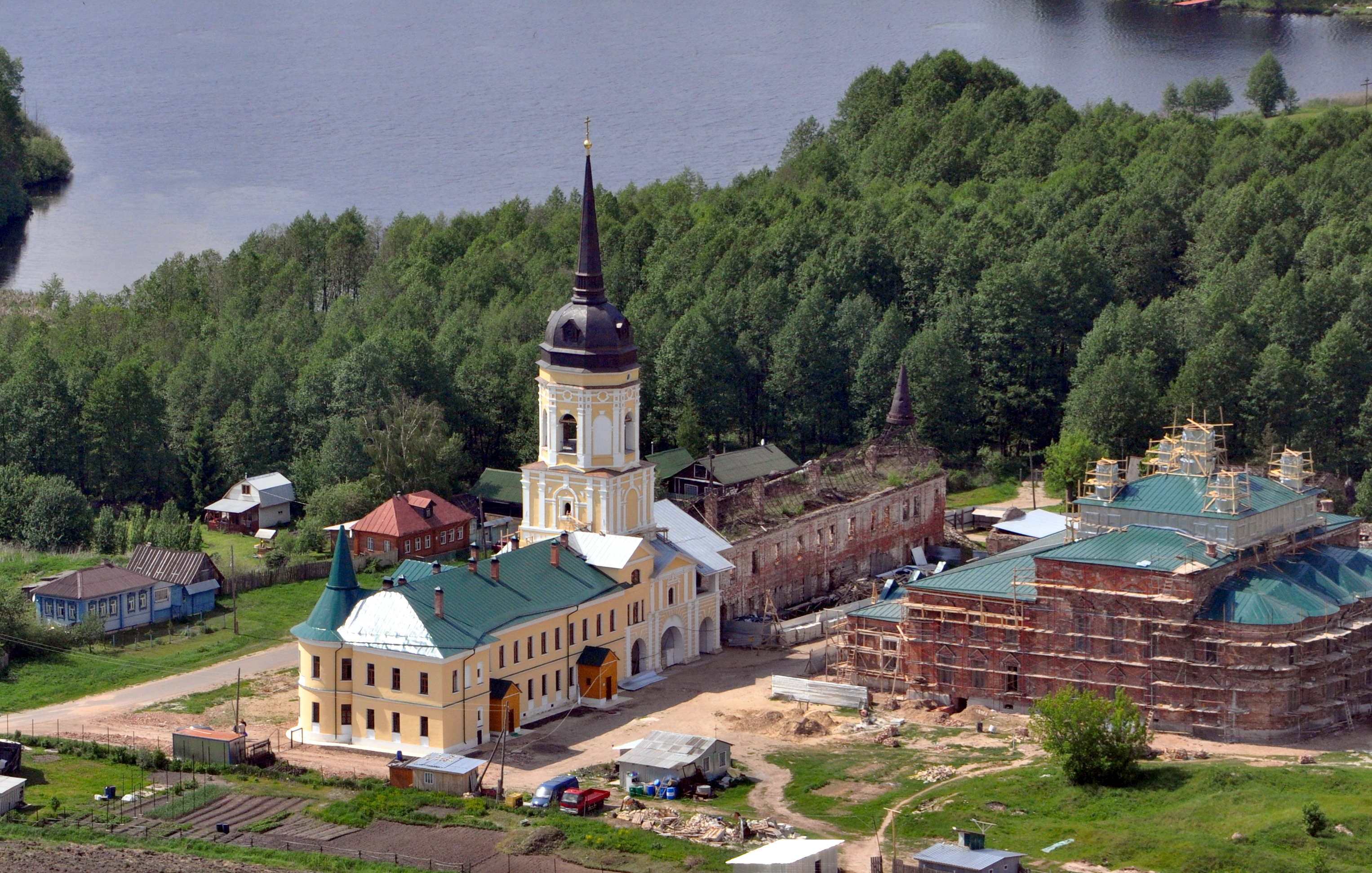 Николо-Радовицкий монастырь (село Радовицы Егорьевского района Московской области)